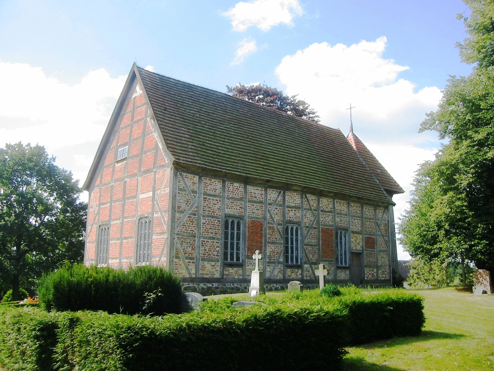 Dorfkirche Kloster Wulfshagen in Marlow: Ansicht von Süd-West